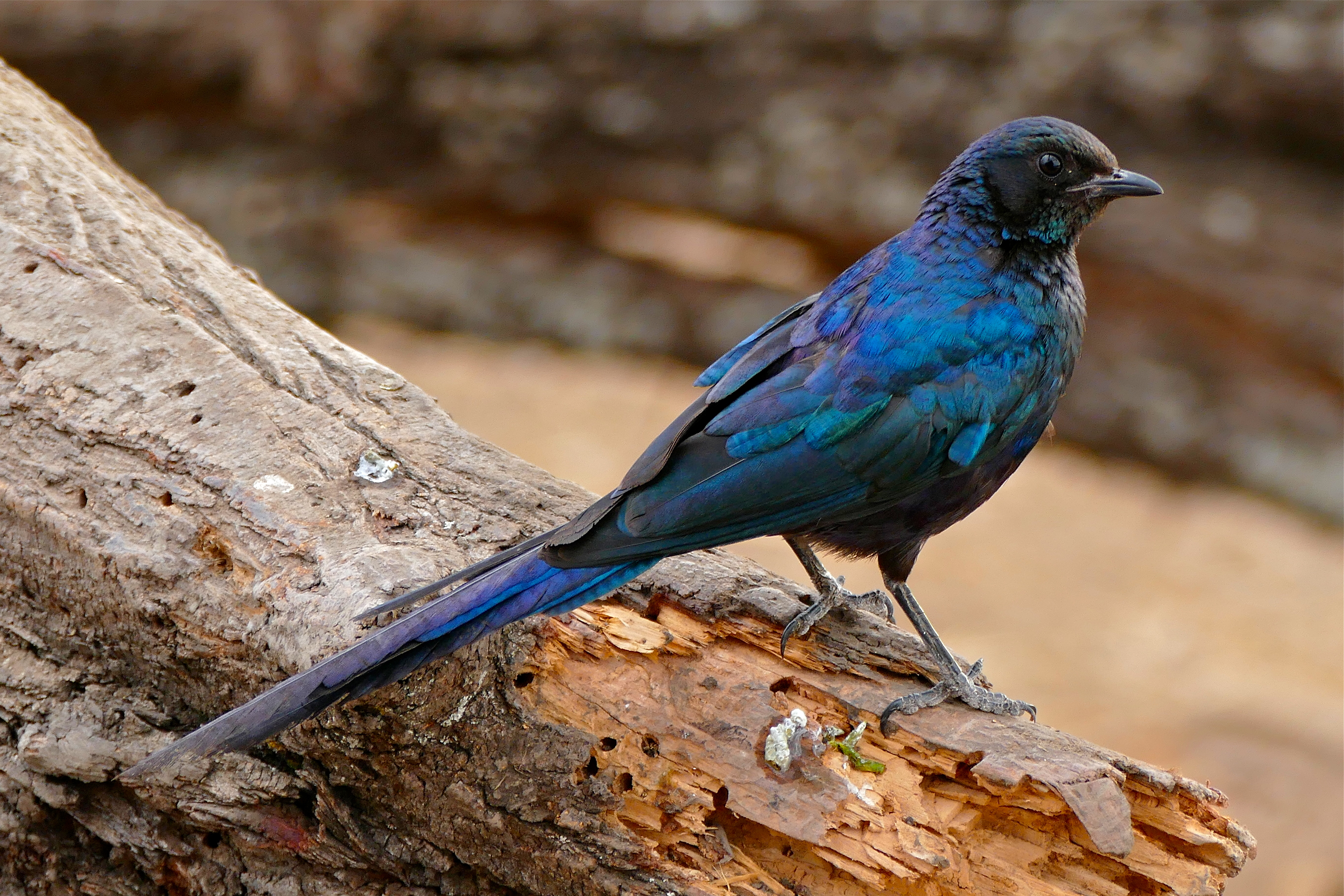 Maloutswa Pan Hide, Mapungubwe NP, Limpopo, SOUTH AFRICA